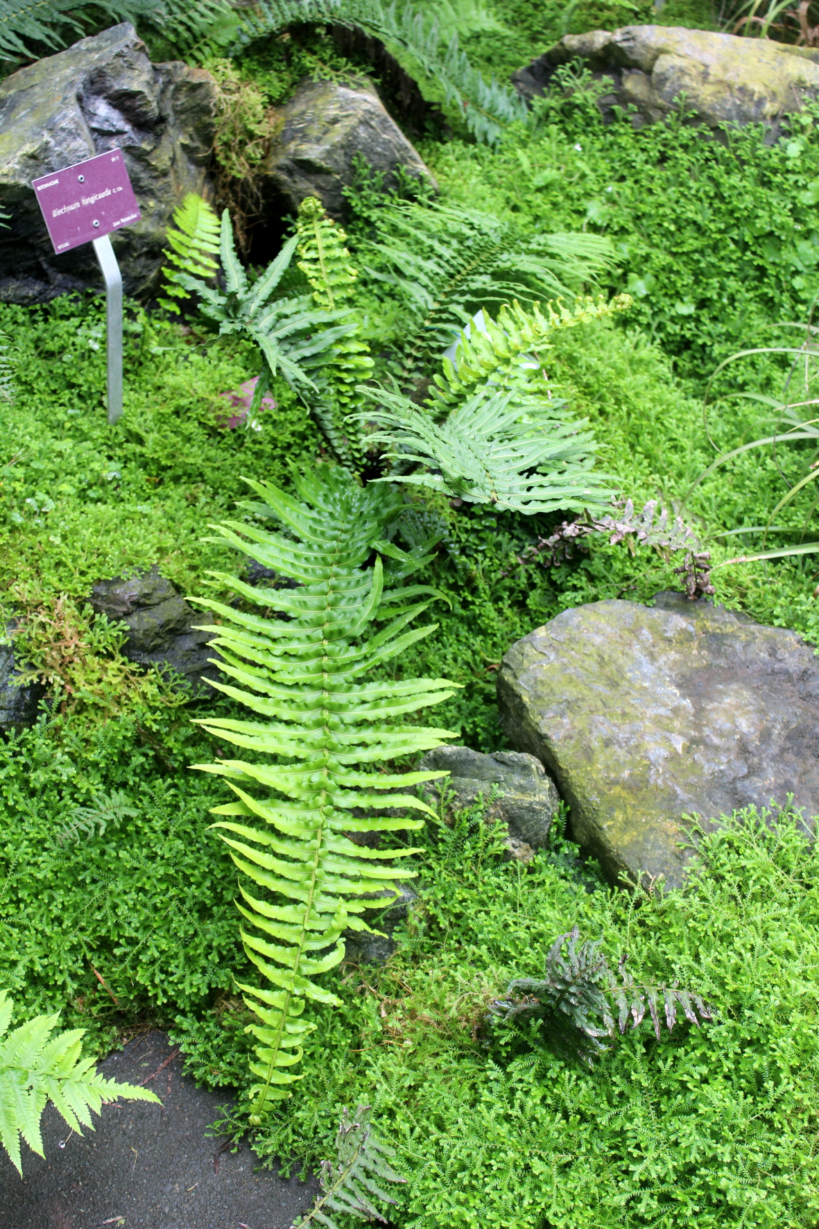 L'espèce "Poupartia castanea" dans les serres tropicales du Conservatoire Botanique National de Brest. Photo prise lors des journées contributives au Conservatoire Botanique National de Brest durant l'été 2015